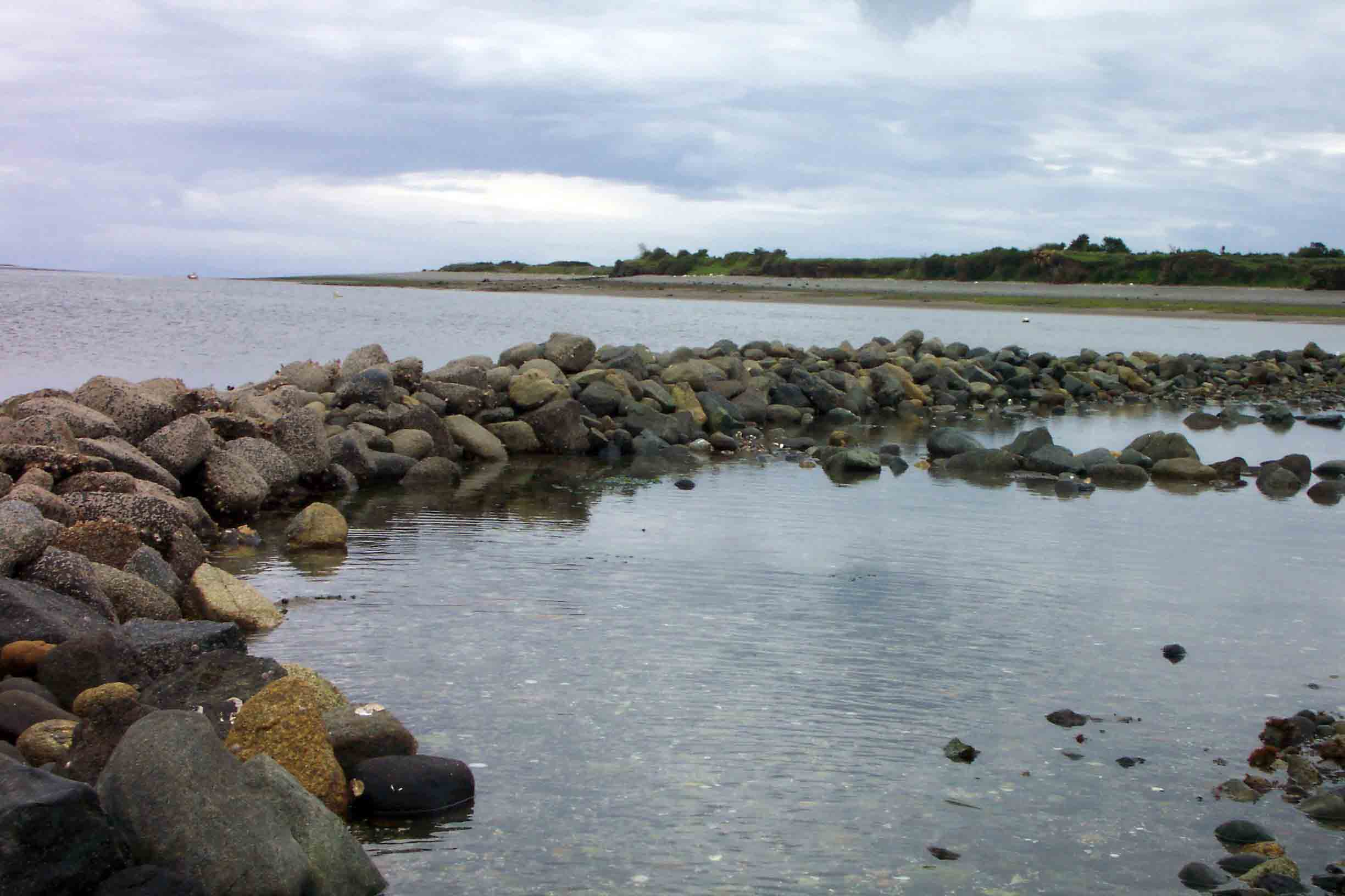 Corral de rocas situado en isla Caguach, Chiloé, Chile.